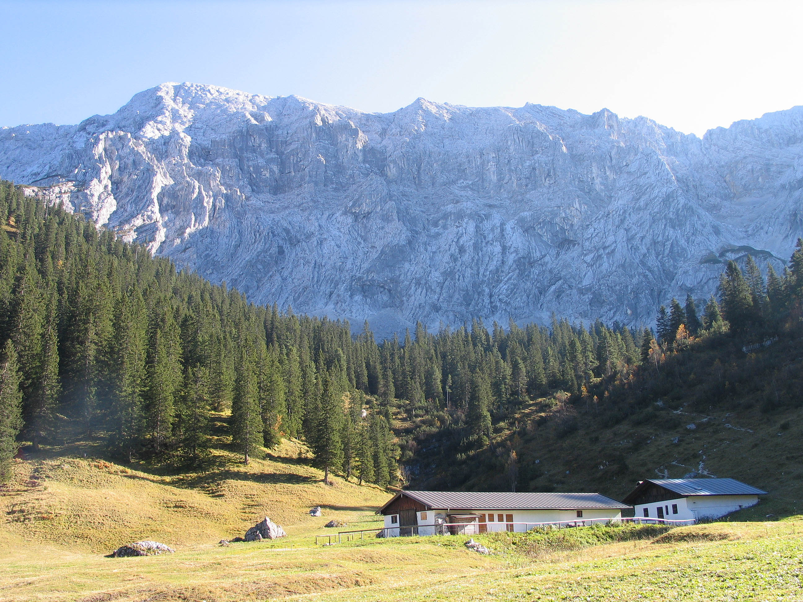 Die Wettersteinalm (1464 m), Wetterstein Photograph: Luidger (15. Oktober 2006)